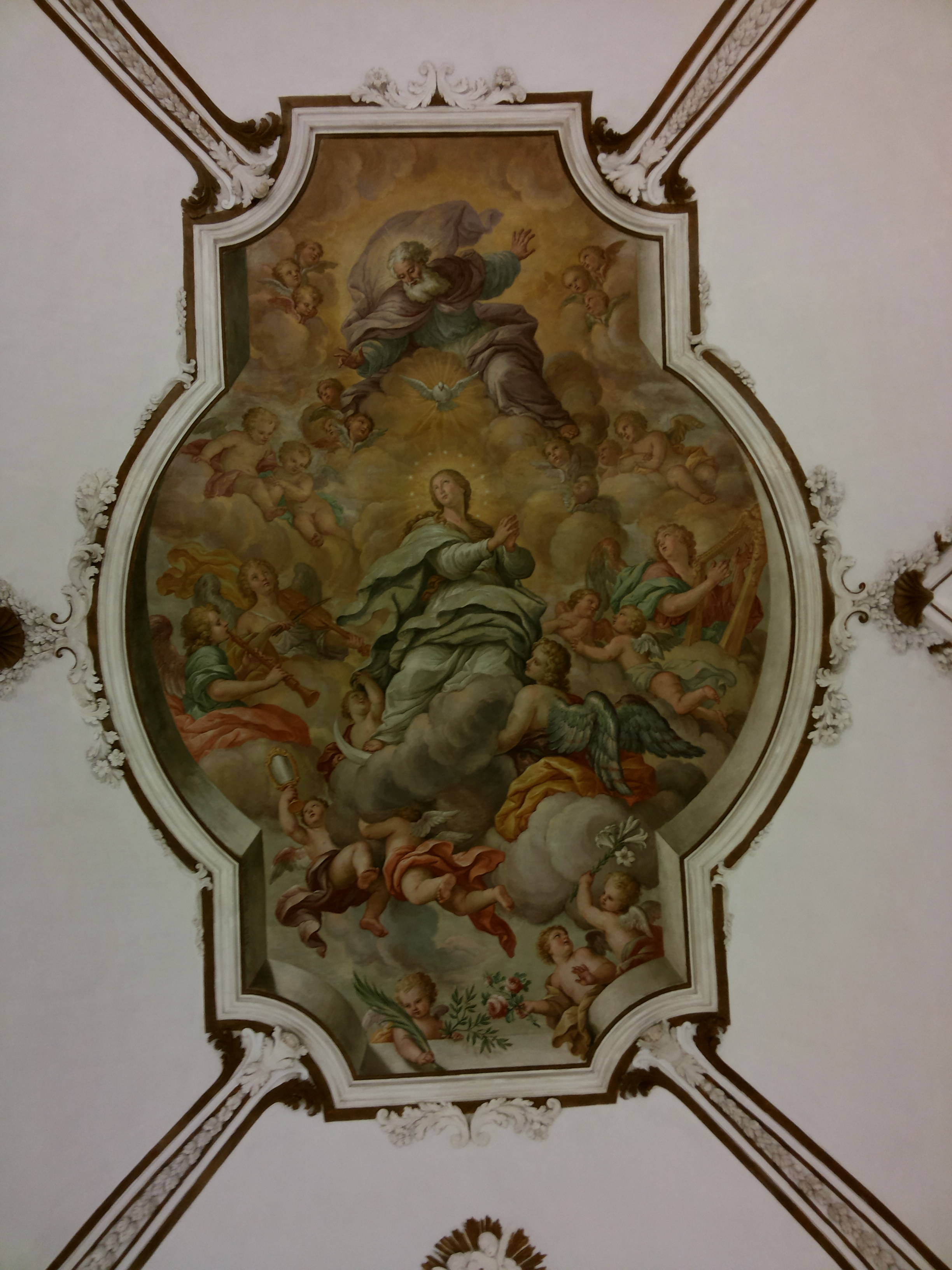 Gloria dell'Immacolata, affresco nell'Oratorio dell'ex Collegio dei Gesuiti di Alcamo